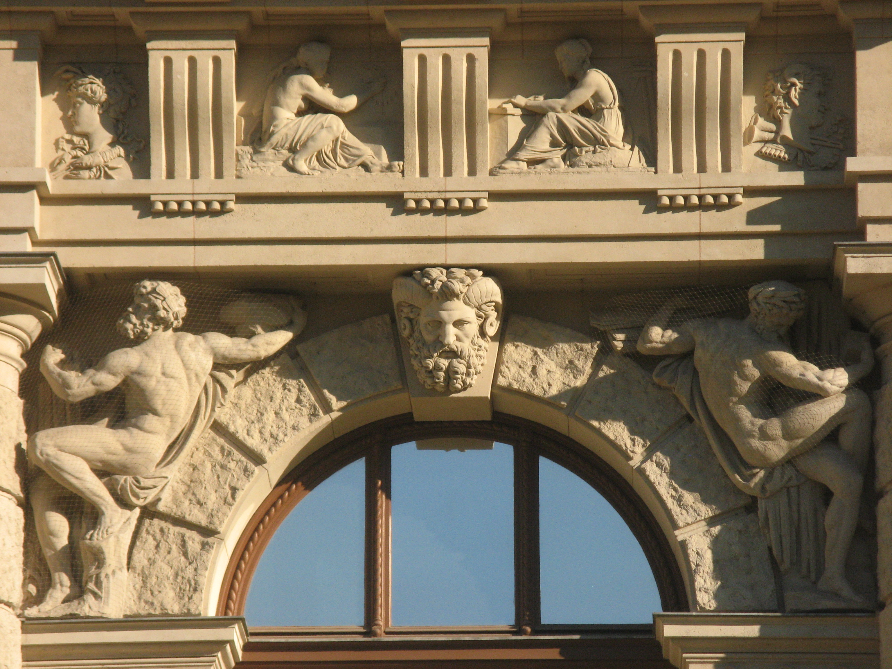 Detail vom Mittelrisalit des Naturhistorisches Museum (Zeus Ammon von Carl Kundmann), Bellariastraße 1, Wien-Innere Stadt